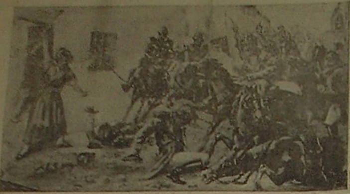 "La Galana", con la cachiporra golpeando a los soldados caidos de los caballos.